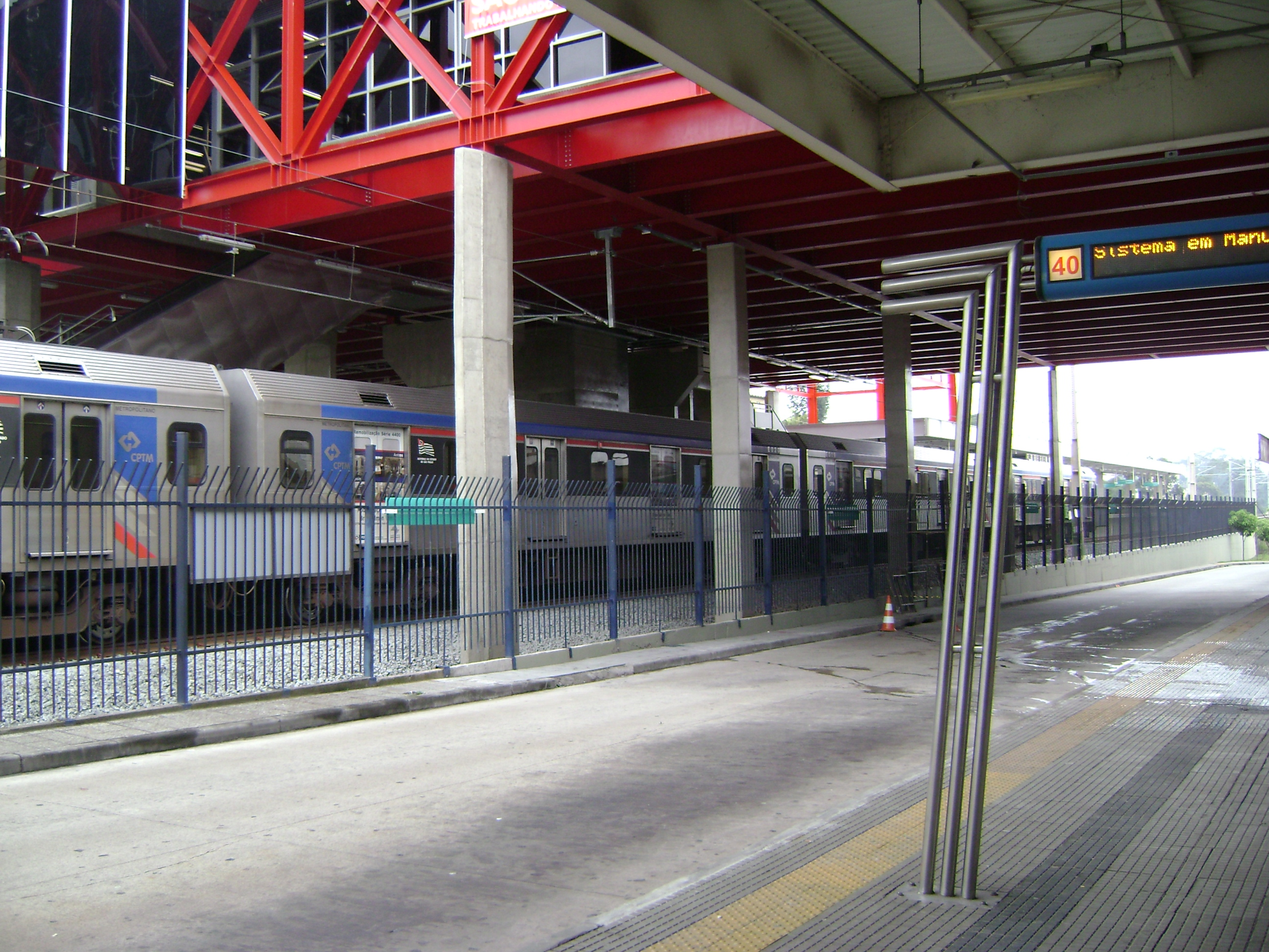 Photo Grajaú Station